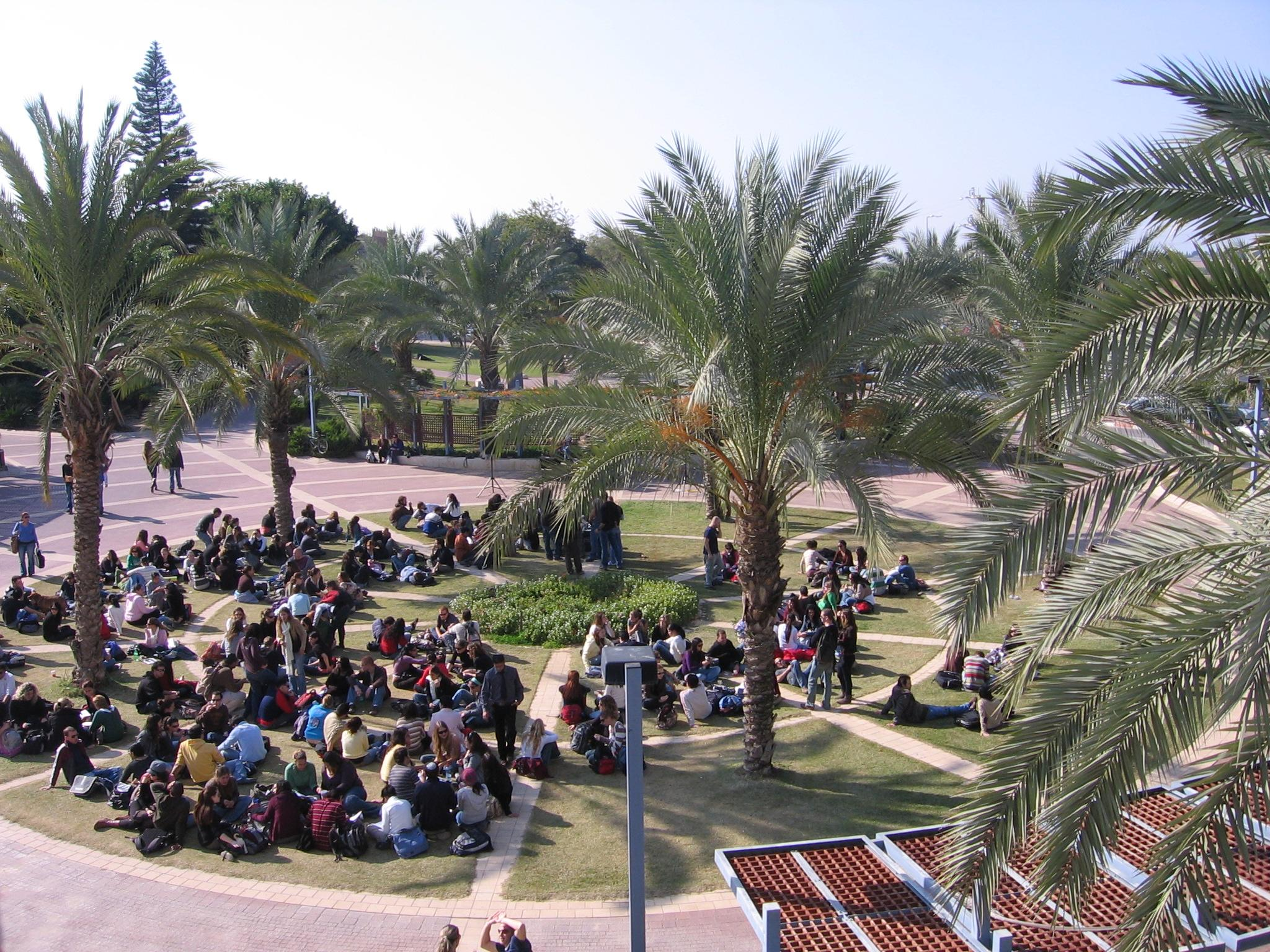 המכללה האקדמית ספיר - כיכר מרכזית